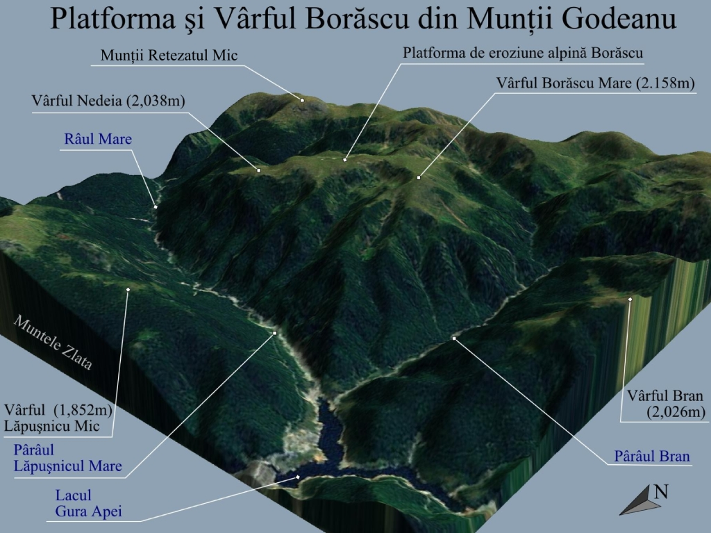 Harta 3D pentru Platforma de eroziune alpina si Varful Borascu din Muntii Godeanu, Romania.